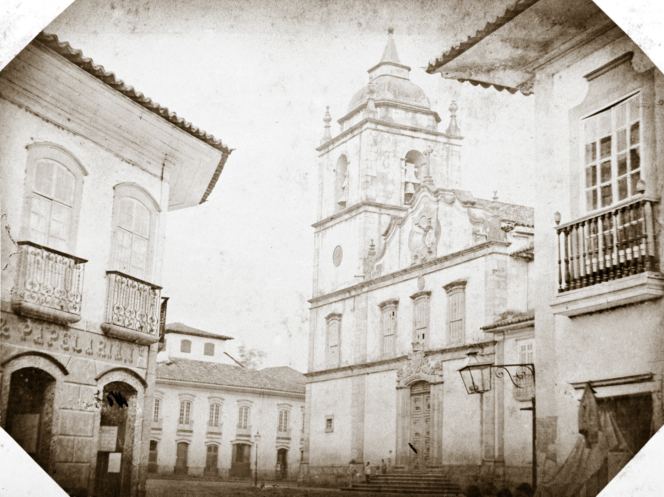 Página 47 do Álbum Comparativo da Cidade de São Paulo. Obra que integra o acervo do Museu Paulista da USP.